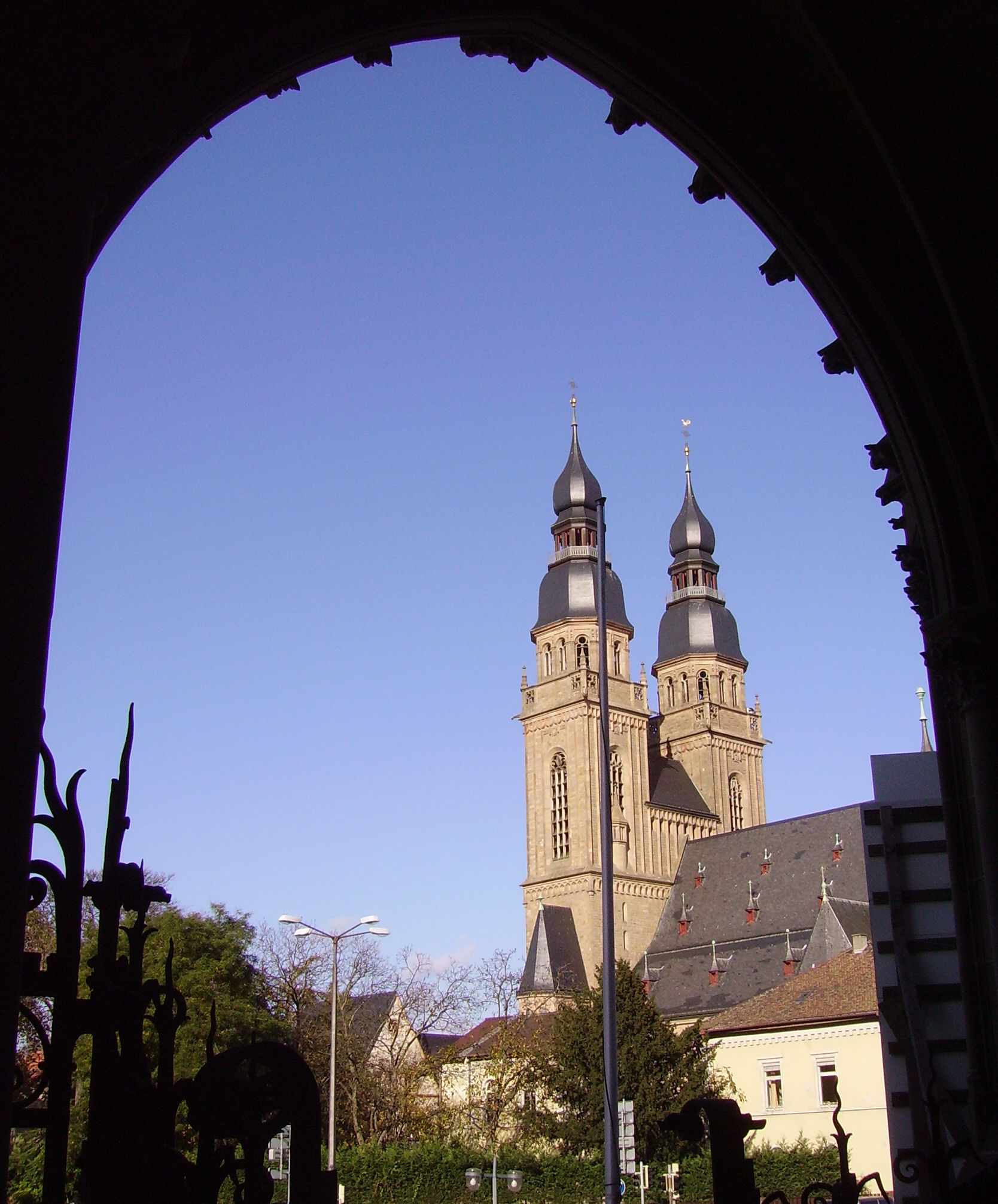 St. Josfskirche in Speyer, Germany